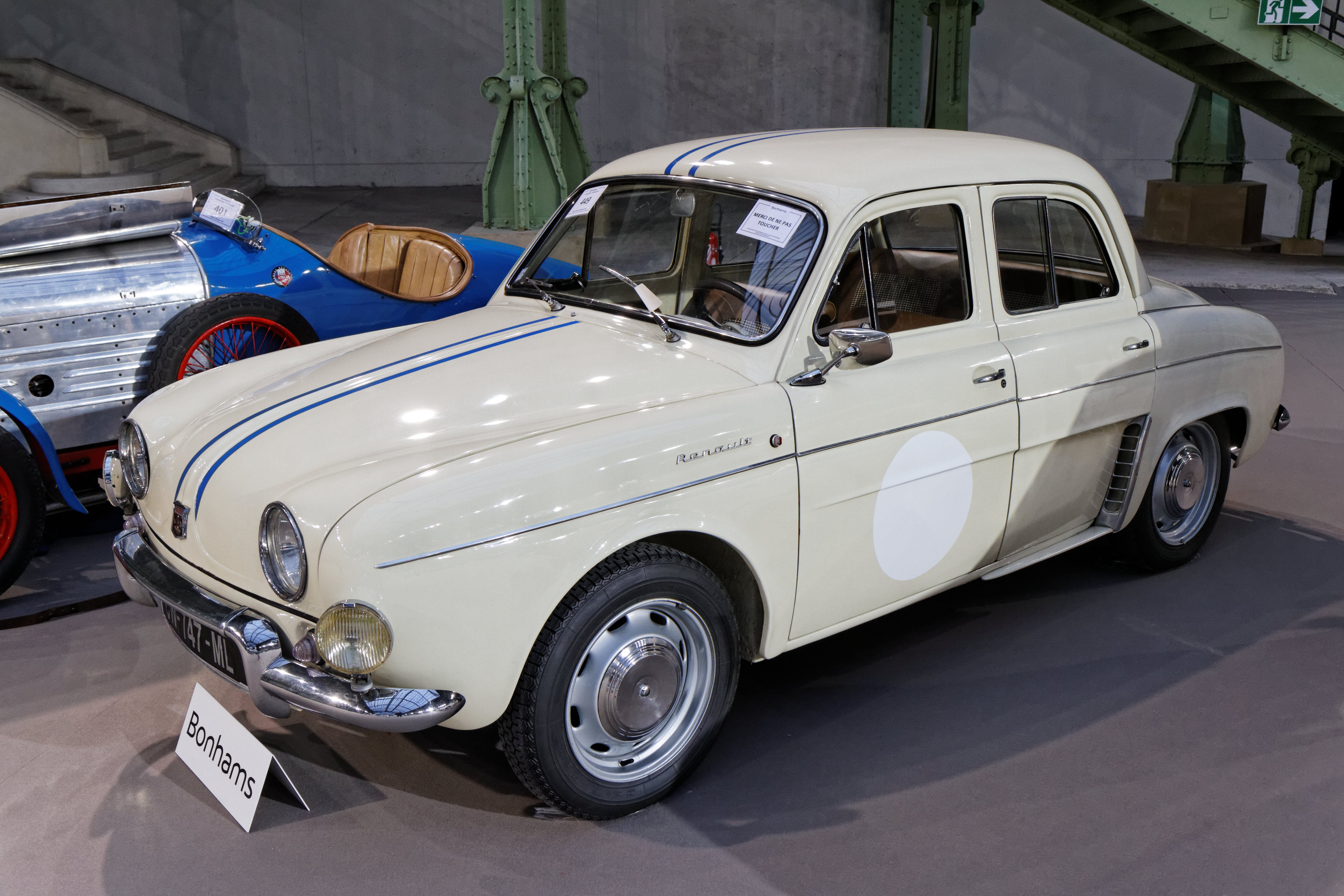 Une Renault Dauphine 1093 saloon au Grand Palais lors de la vente Bonhams en février 2014.